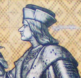 Dresdner Fürstenzug - Albert der Beherzte